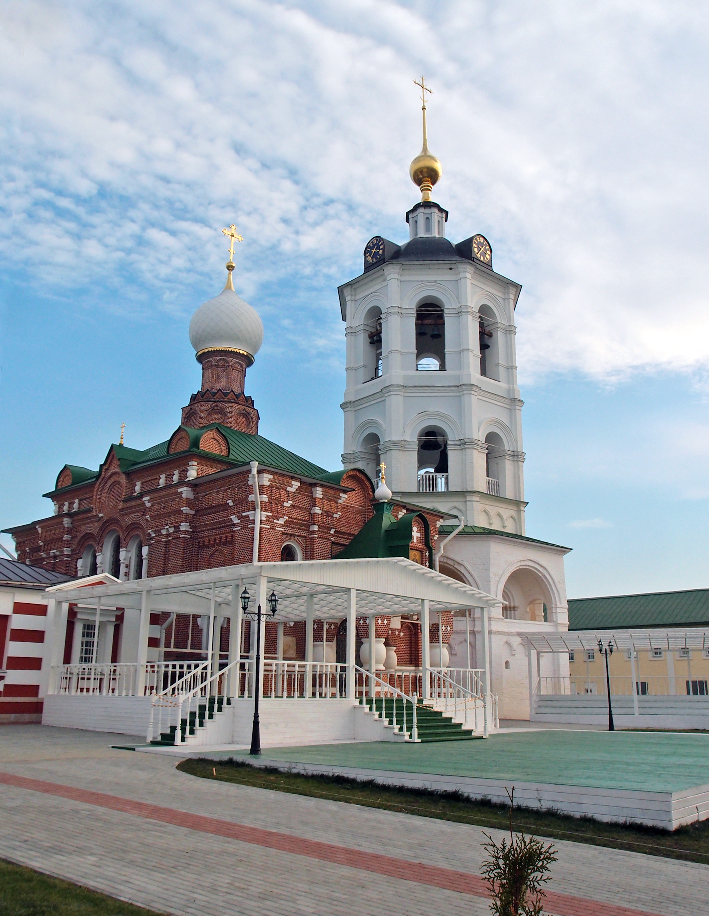 Церковь Сергия Радонежского (на могиле Мефодия, игумена Пешношского) (Москва и Московская область, Солнечногорск, село Рогачево (посёлок Луговой))